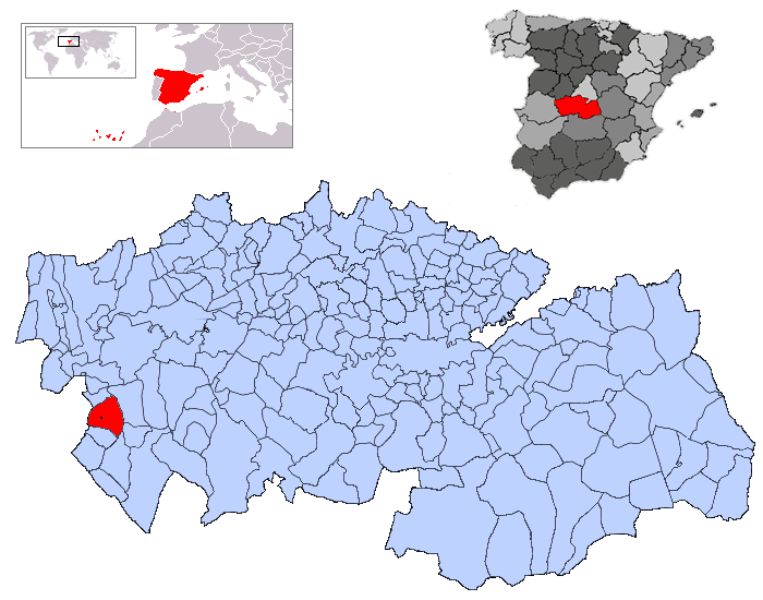 L a Estrella en la provincia de Toledo